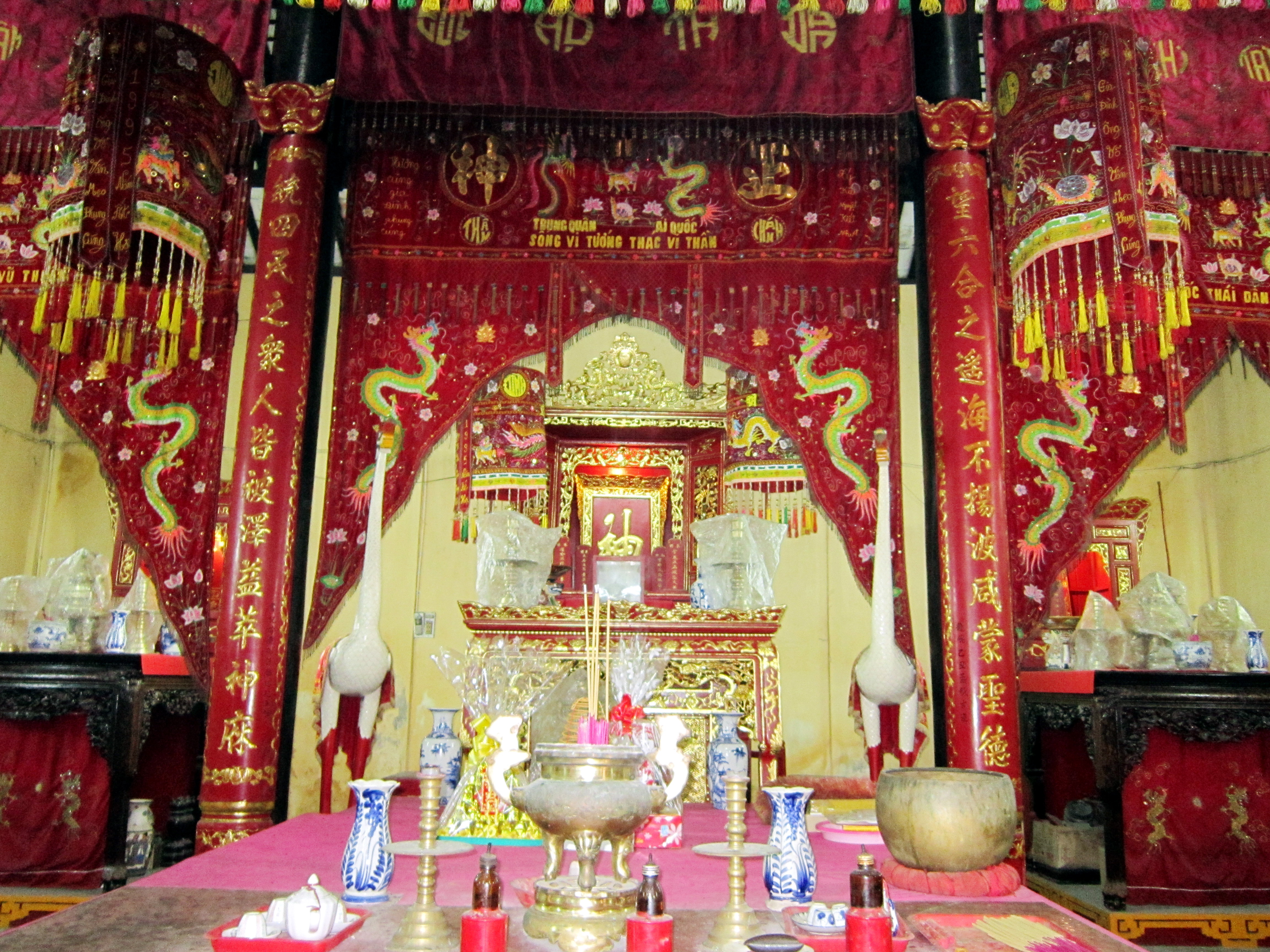 Bàn thờ Thần trong đình Bình Hòa ở quận Bình Thành, Thành phố Hồ Chí Minh, Việt Nam.